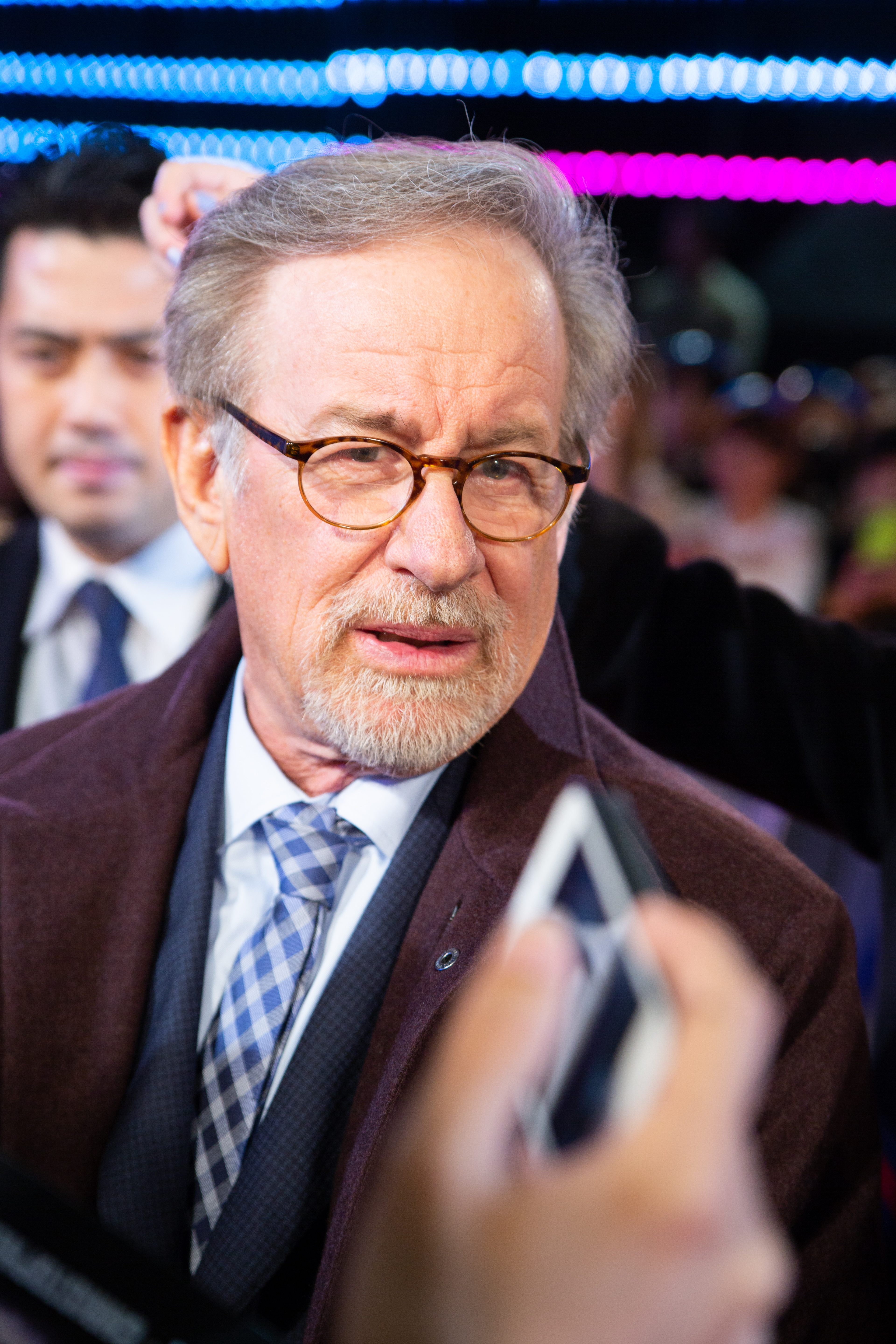 レディ・プレイヤー1 ジャパン・プレミア レッドカーペット スティーヴン・スピルバーグ